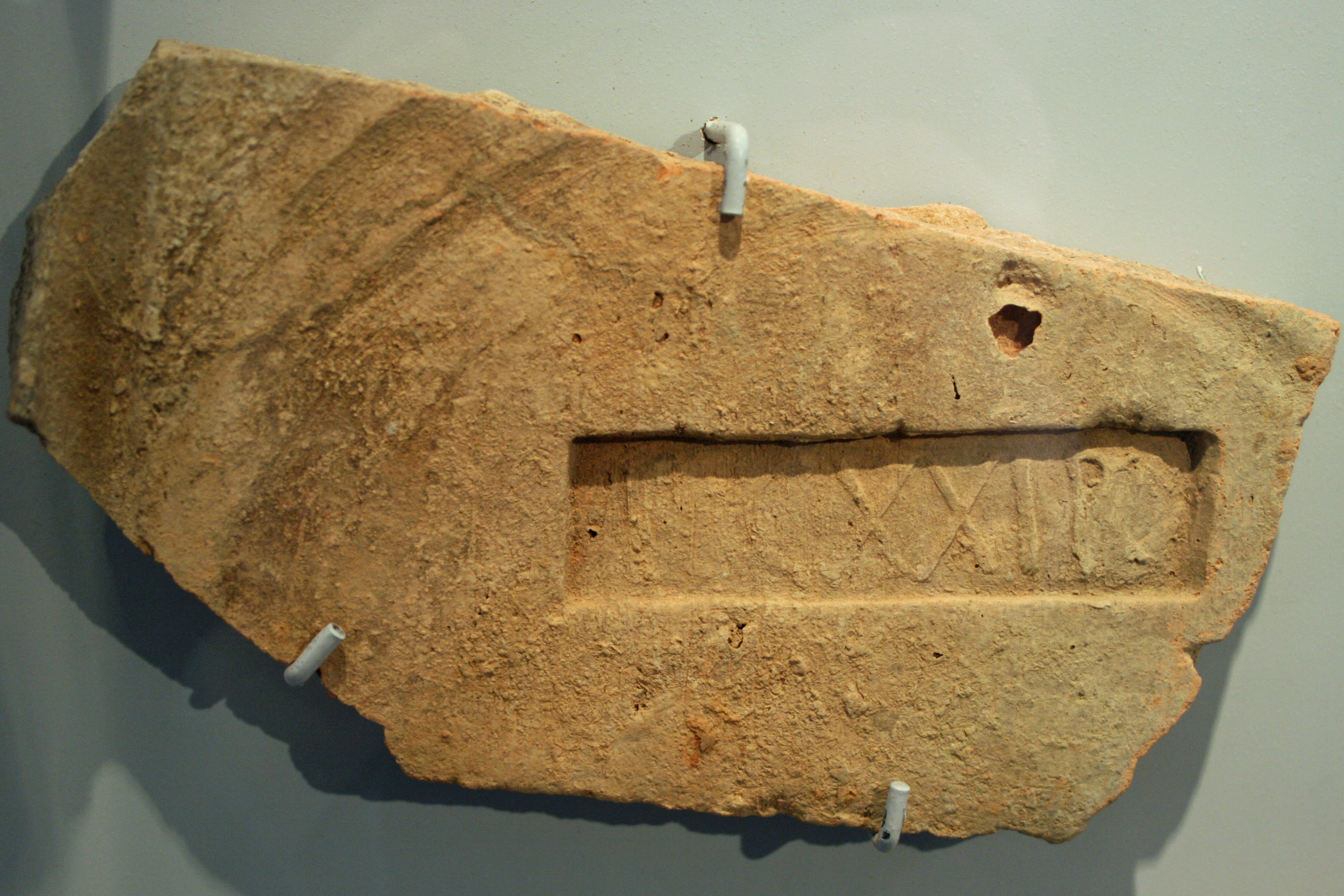 Ziegelstempel der Legio XXI Rapax aus Rheinzabern, gefunden in Okarben, ausgestellt im Terra-Sigillata-Museum Rheinzabern.AE 1903, 00092a, in Epigraphik-Datenbank Clauss/Slaby